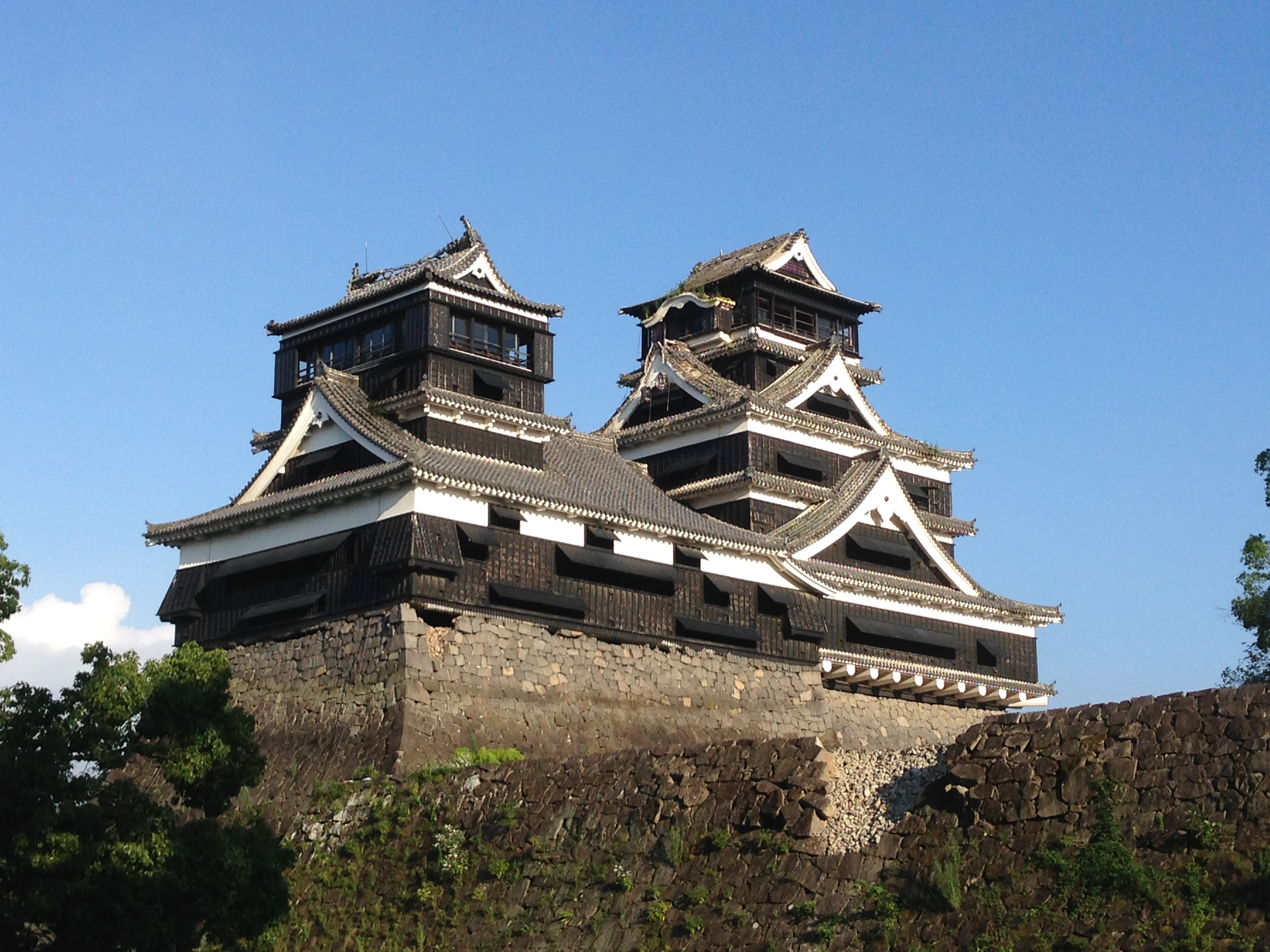 熊本地震 (2016年)後のja:熊本城。加藤神社より撮影。